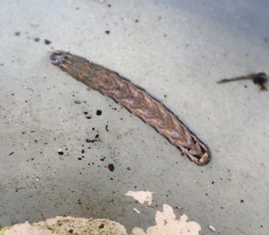 double square-spot caterpillar